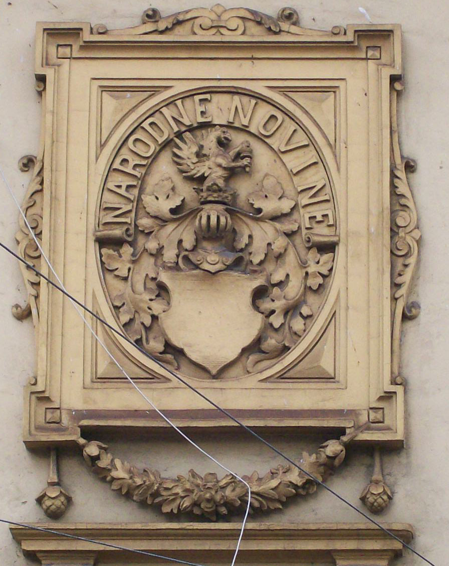 Narodne novine - reljef na zgradi u Frankopanskoj ulici, Zagreb